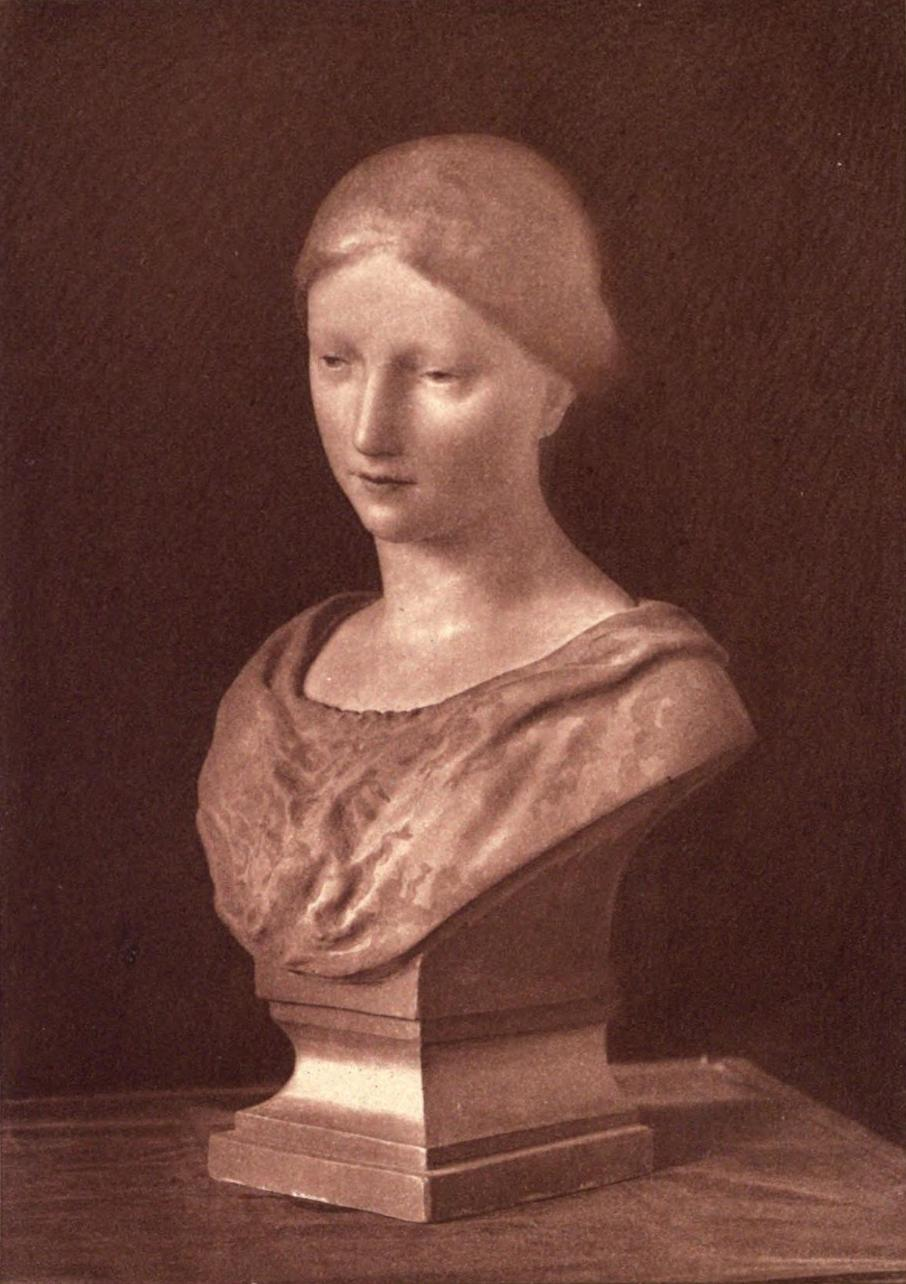 Tête de jeune fille en cire (Italie, s.d.) léguée à la Société des sciences, de l'agriculture et des arts de Lille par Jean-Baptiste Wicar.